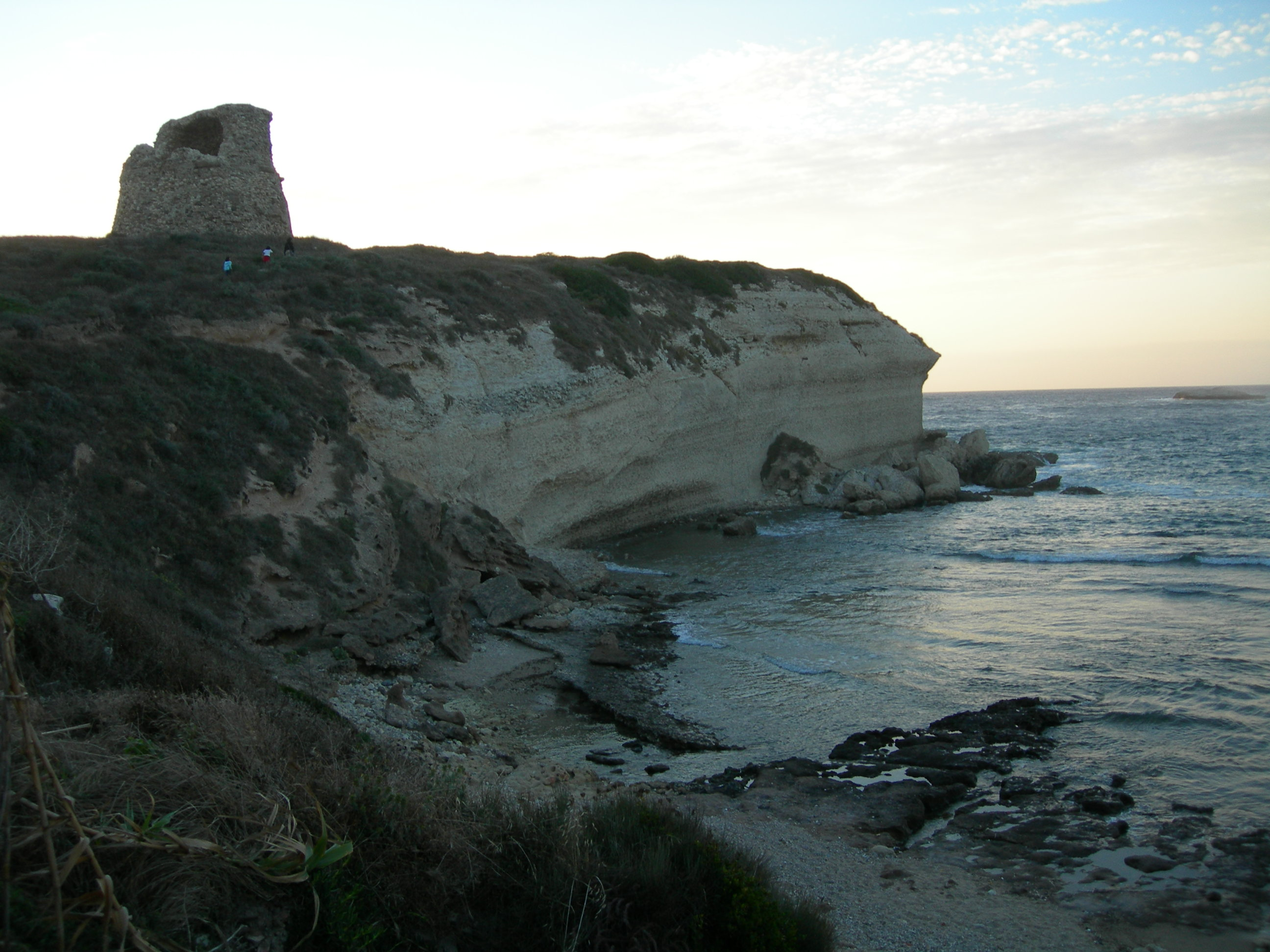 Scogliere di Torre del Pozzo, Cuglieri (OR)